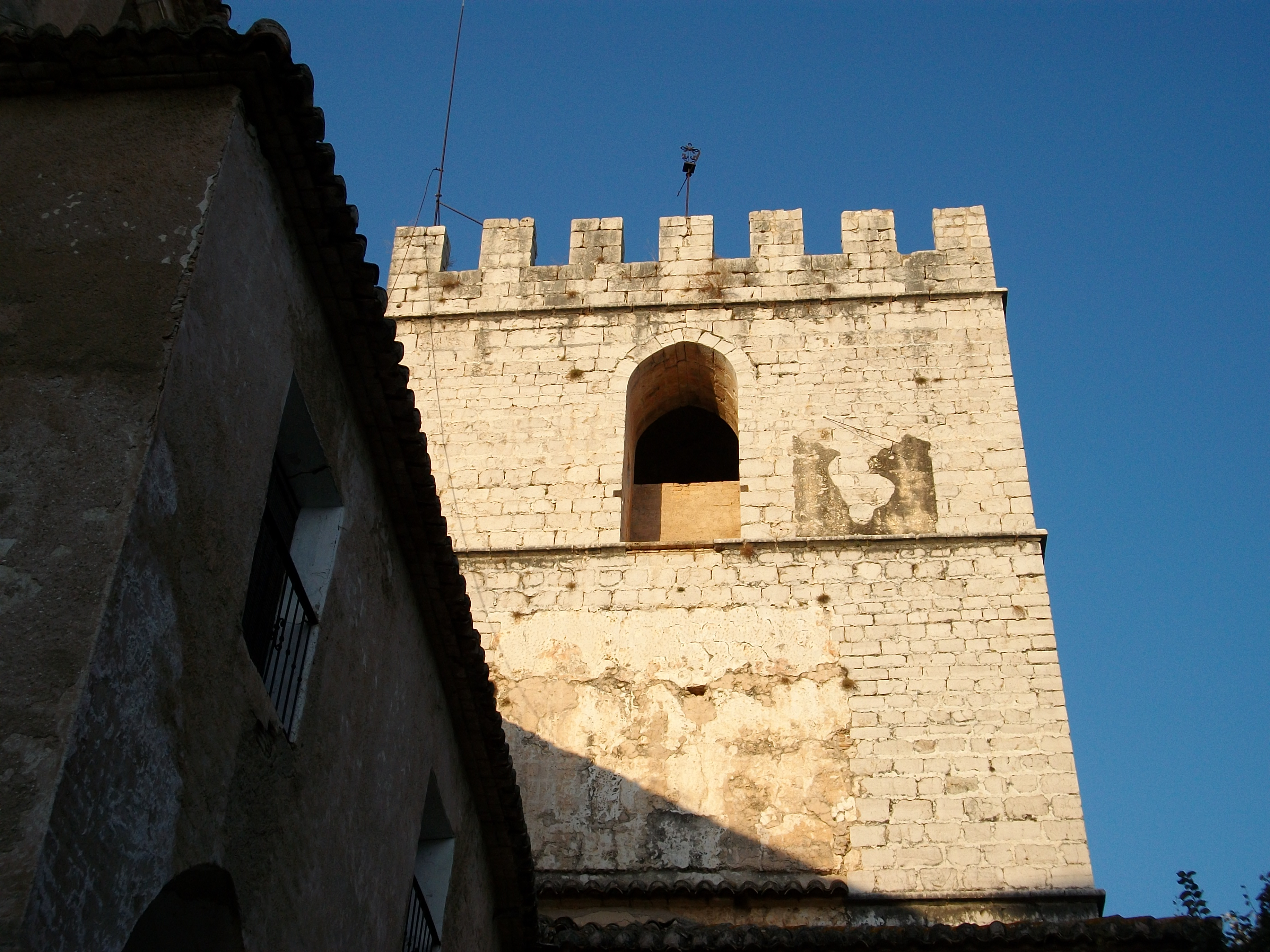 Torre de campanes de Cotalba